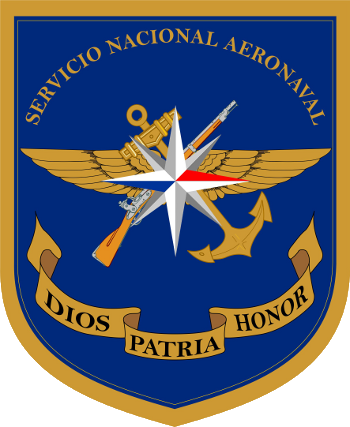 Escudo del Servicio Nacional Aeronaval